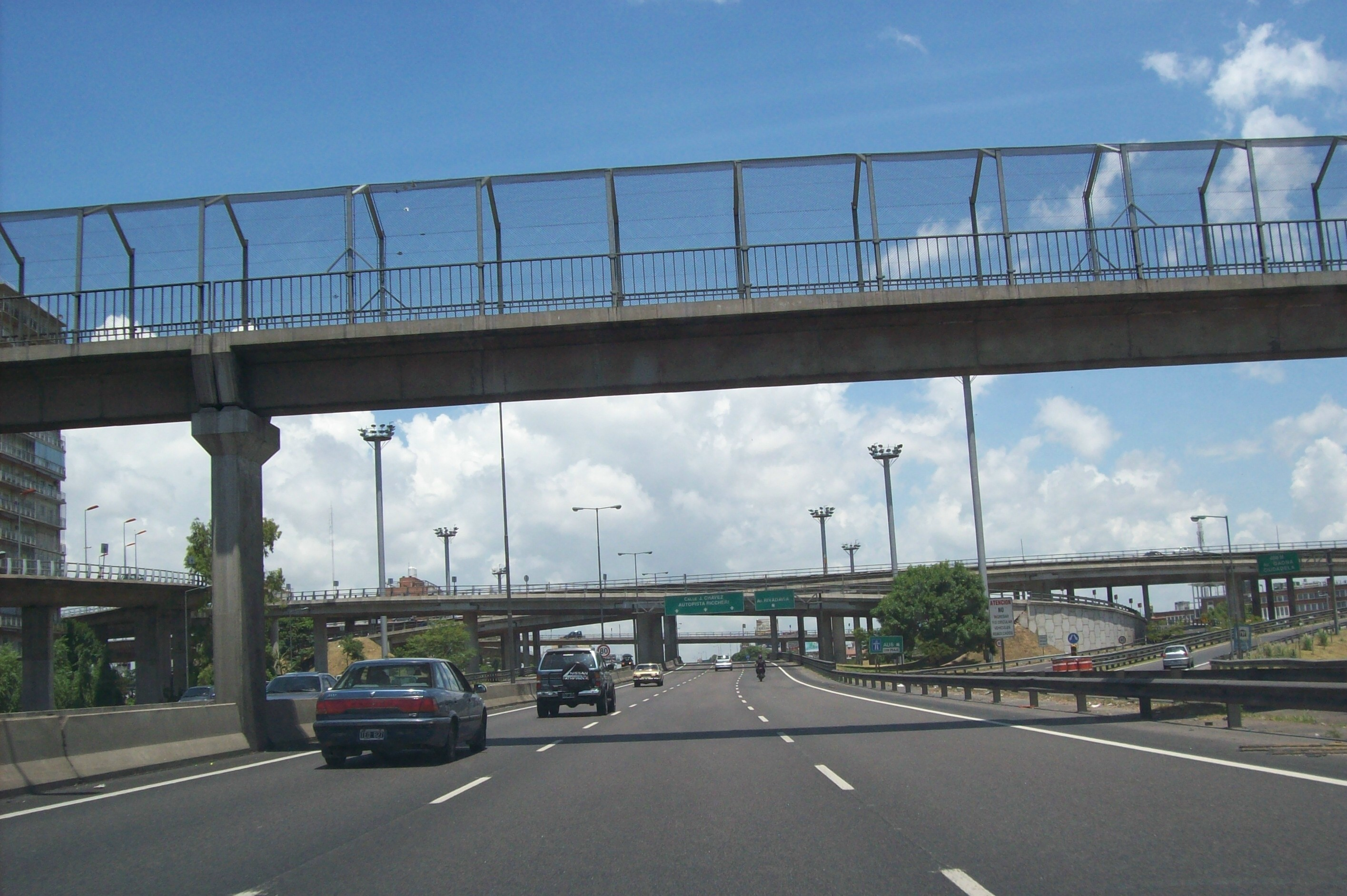 Intercambiador visto desde la Avenida General Paz. La Avenida Juan B. Justo pasa por debajo de ambas autopistas.